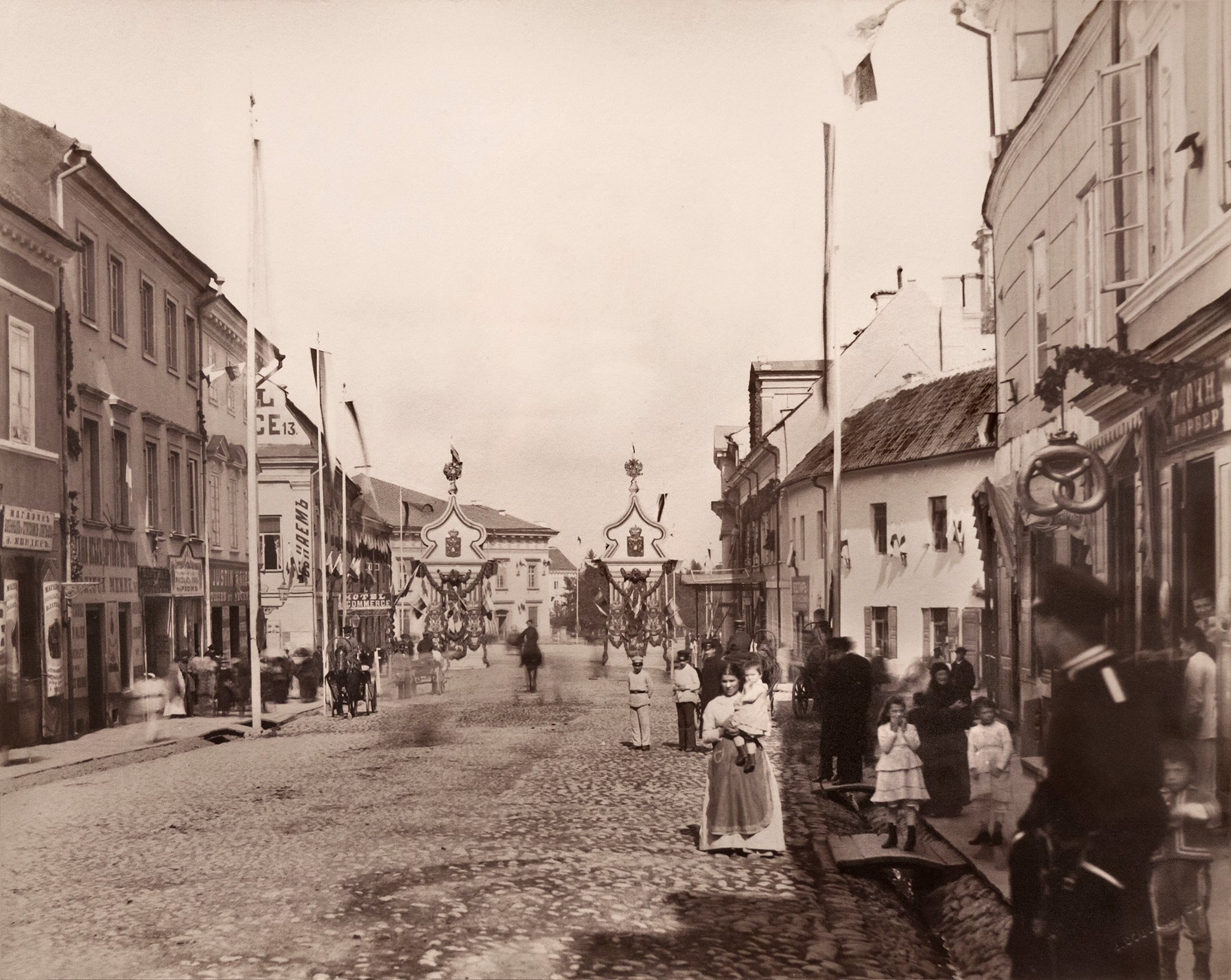 Беларуская (тарашкевіца): Вільня (Vilnia), вуліцы Вастрабрамская (vulica Vastrabramskaja) і Вялікая (vulica Vialikaja)